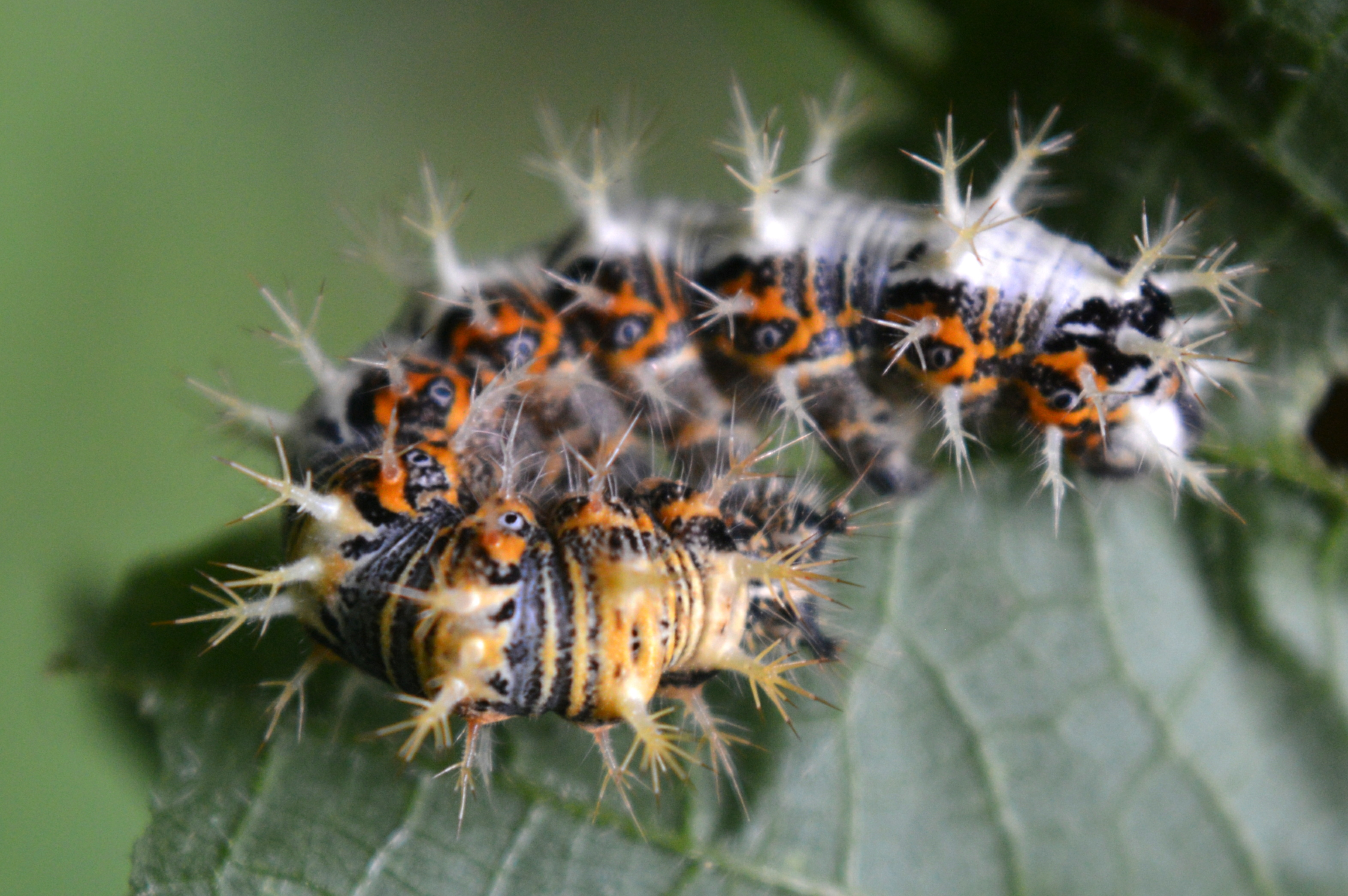 Landschaftsschutzgebiet Solling – Lunau-Tal bei Hardegsen - Raupe des Distelfalter